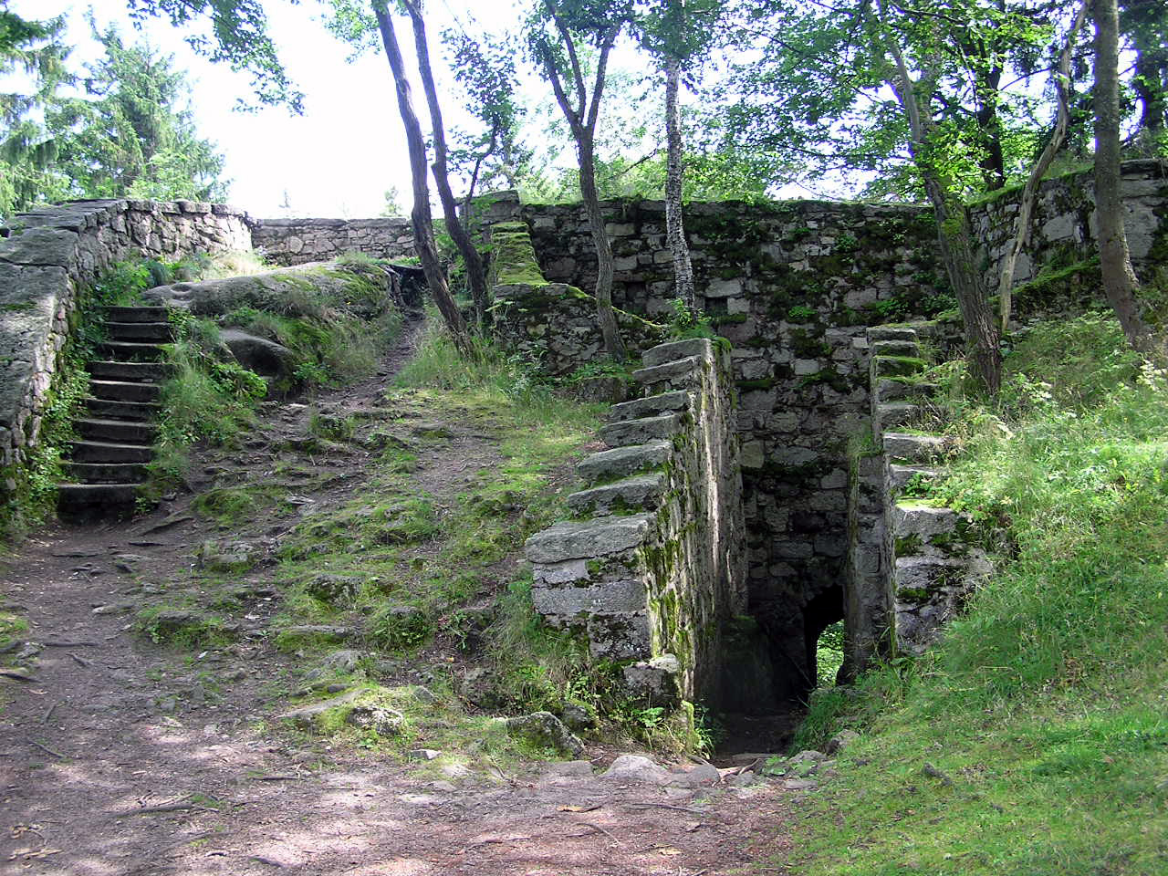 Description: Großer Waldstein, Innenhof Rotes Schloss Source: selbst fotografiert Date: 19. August 2005 Author: Schubbay